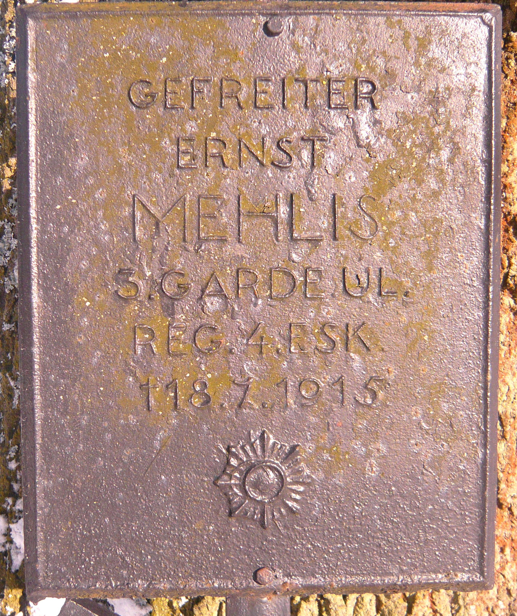 Cmentarz wojenny Rybczewice